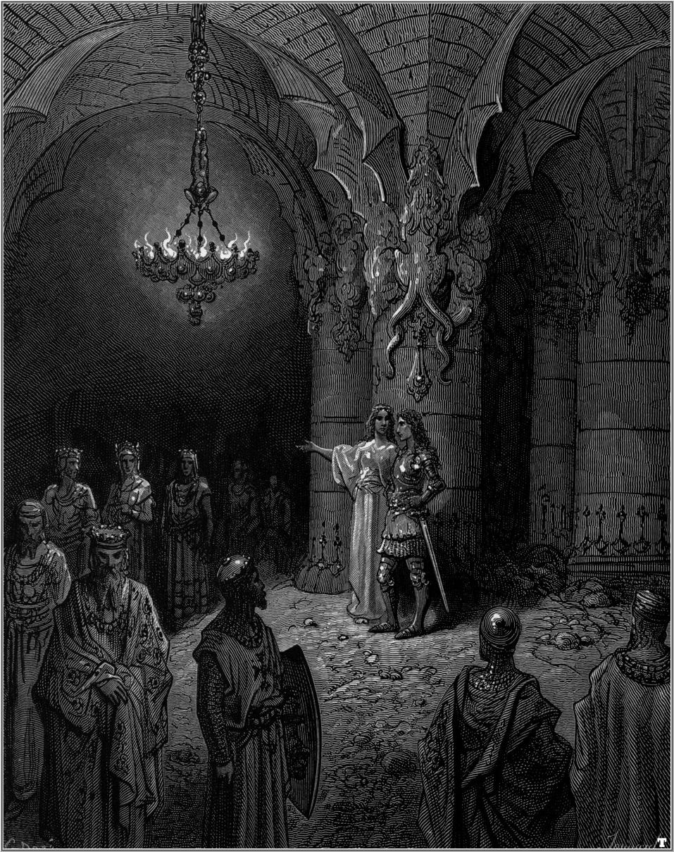 illustration of Ludovico Ariosto’s “Orlando Furioso”.